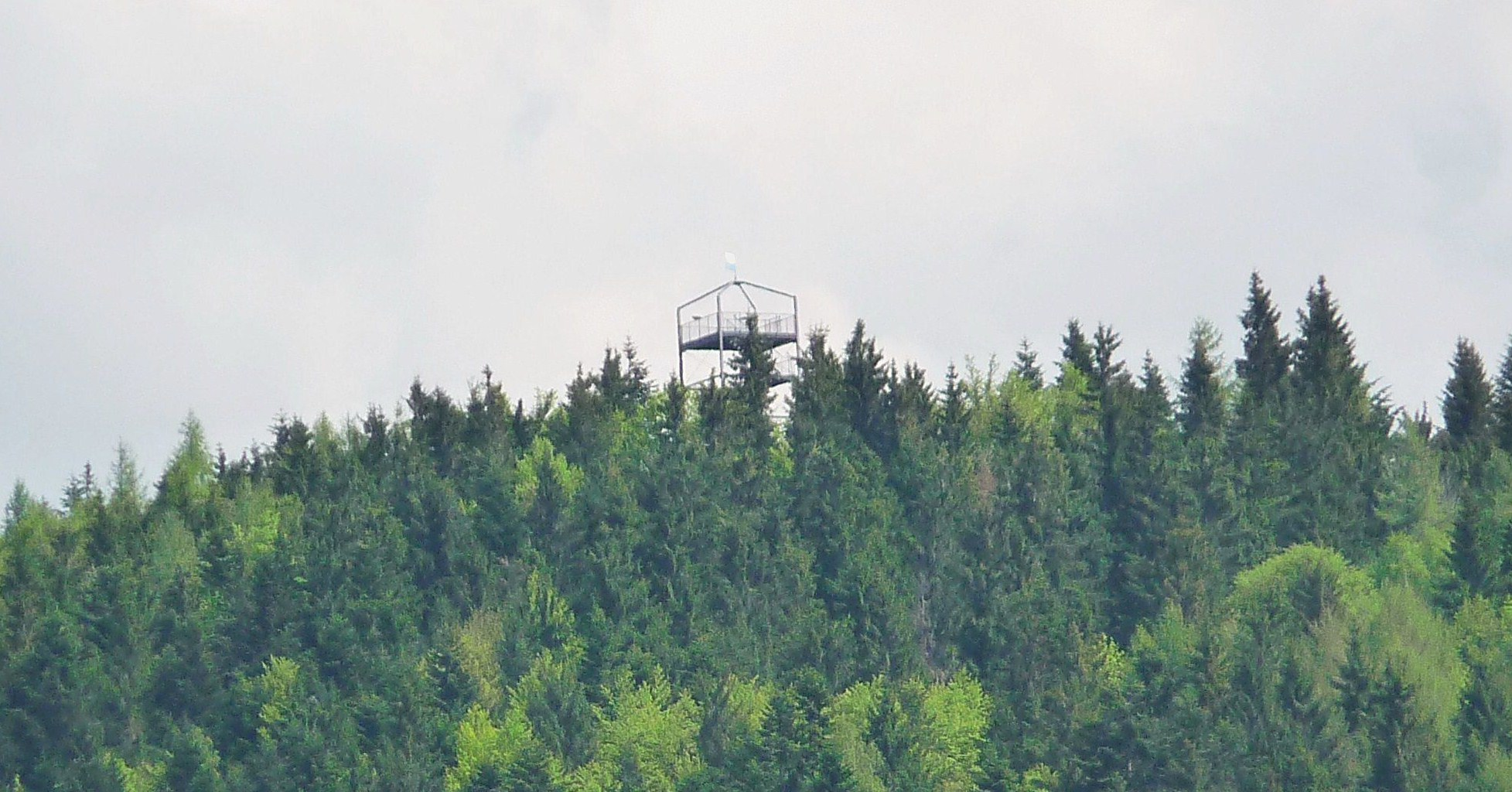 Blick zum Aussichtsturm auf dem 930 m hohen Friedrichsberg